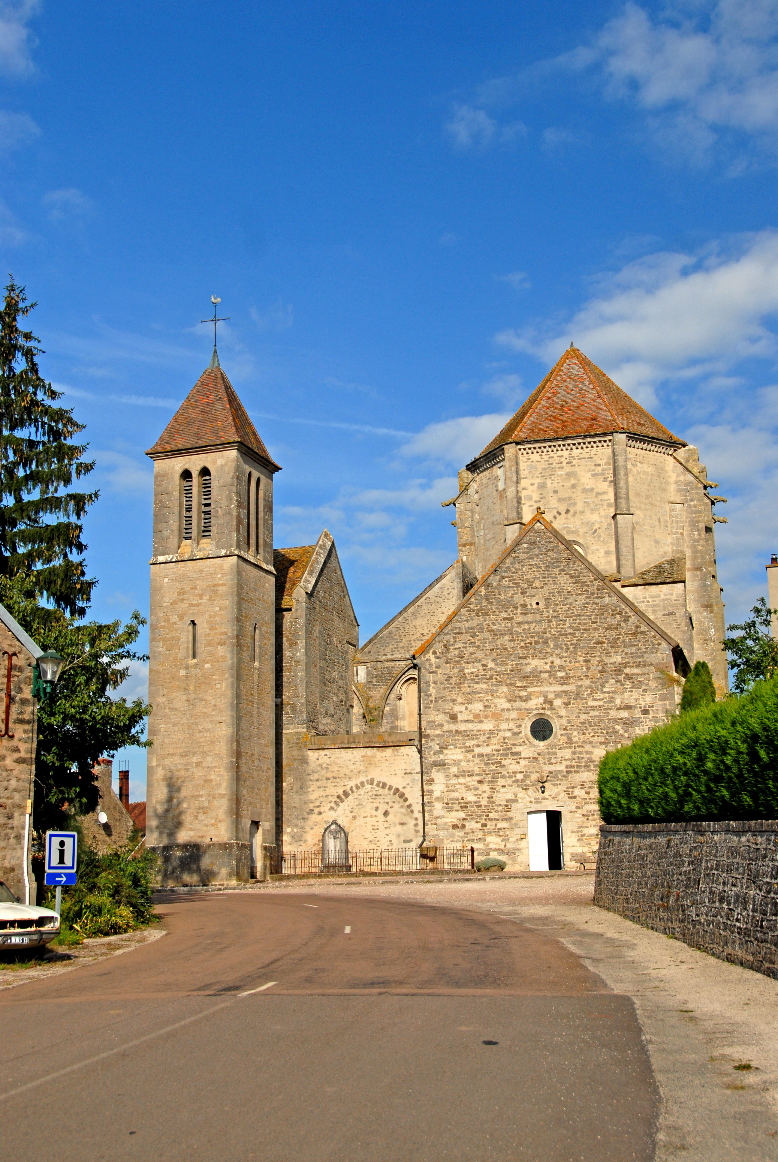 St-Thibault de Saint-Thibault, Westseite